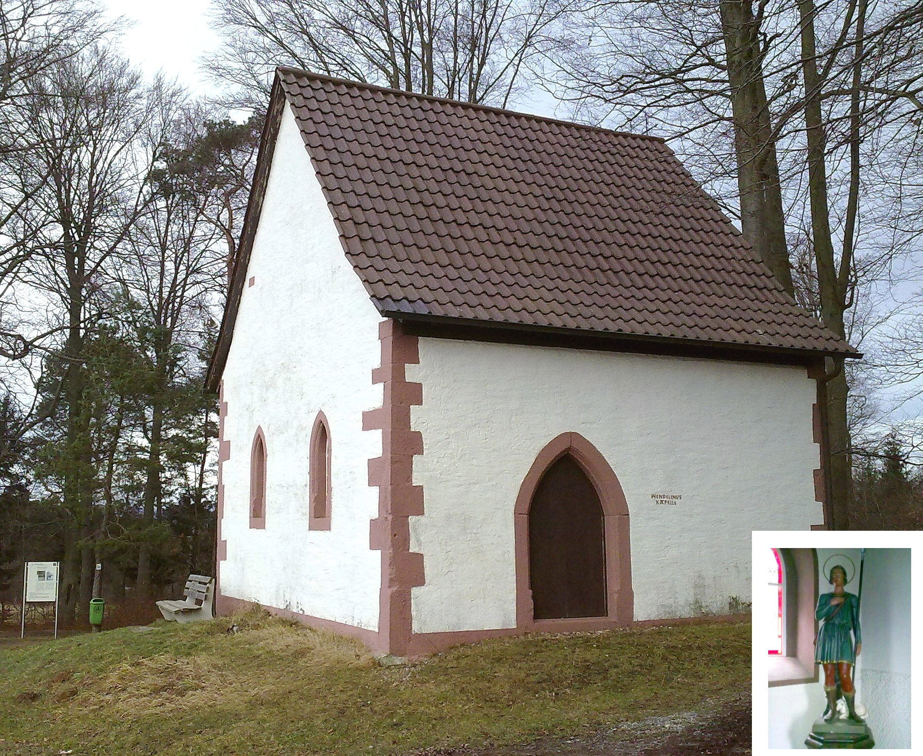 Wendelinuskapelle mit Heiligem Wendelin und Erläuterungstafel bei Wenigumstadt in Bayern im Odenwald